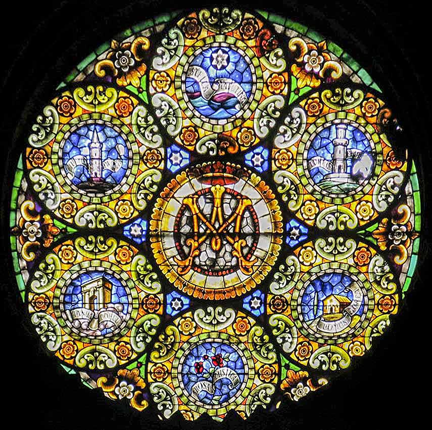 Antiga rosassa romànica de la catedral de Solsona.